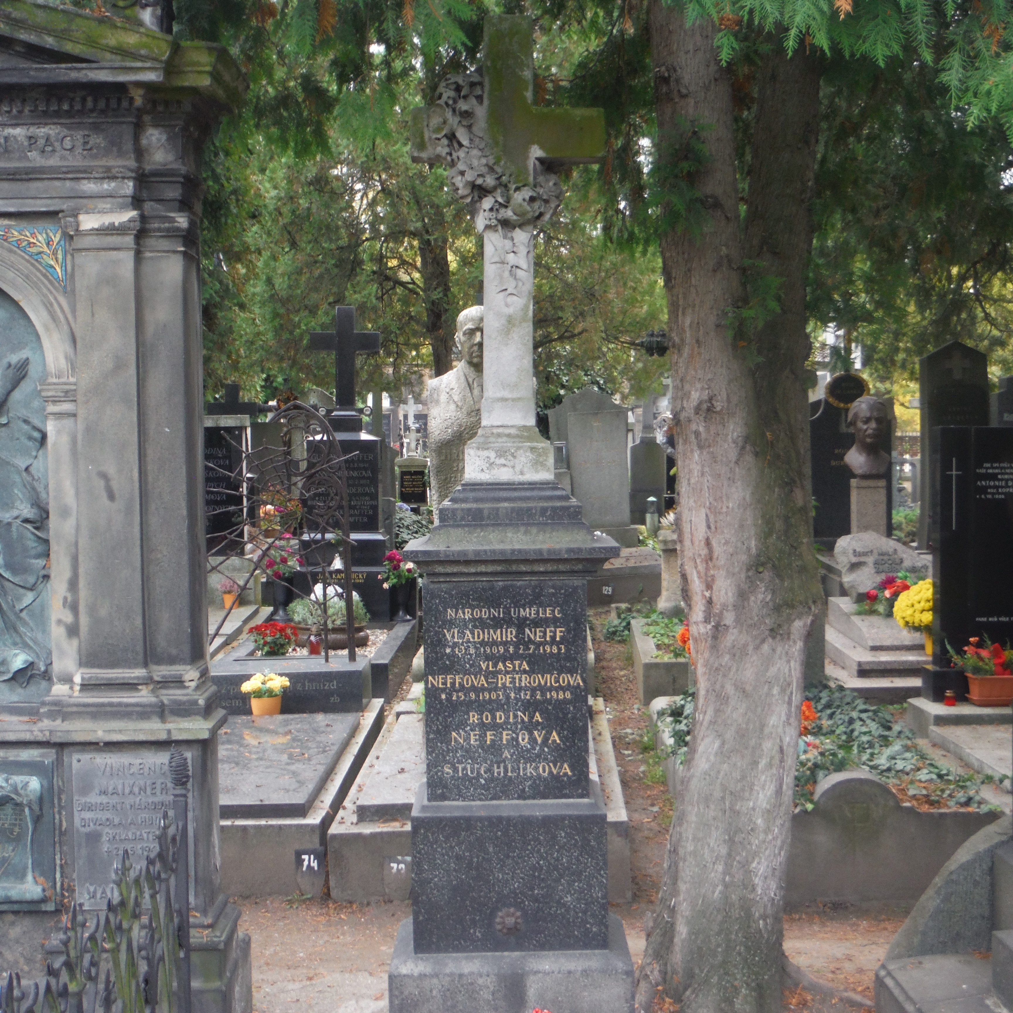 hrob